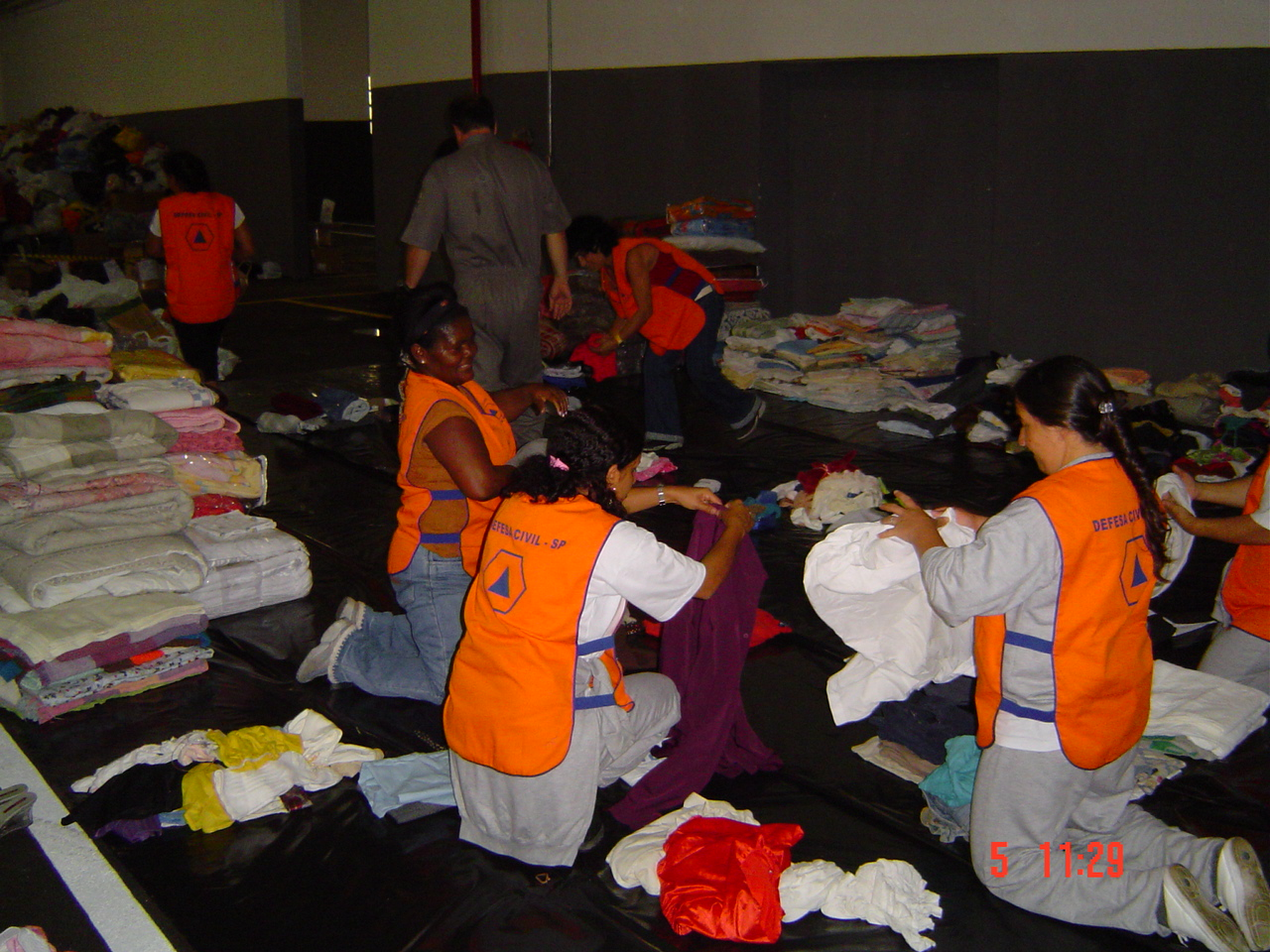 Campanha de arrecadação de donativos, realizada no Estado de São Paulo, Brazil em dezembro de 2004.